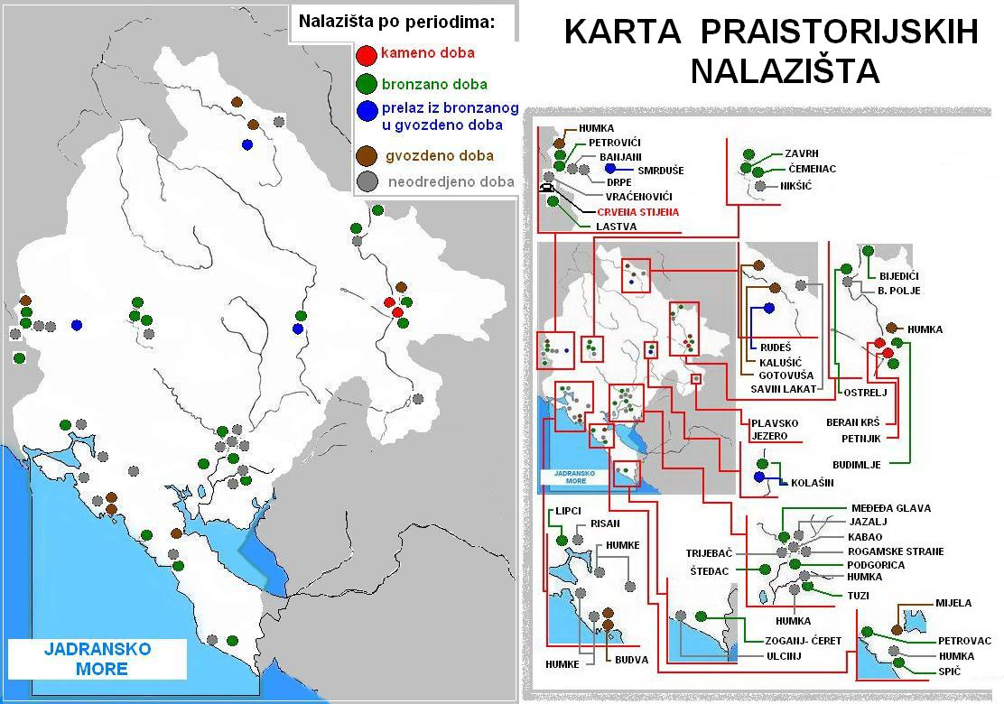 Praistorijska nalazišta u Crnoj Gori.